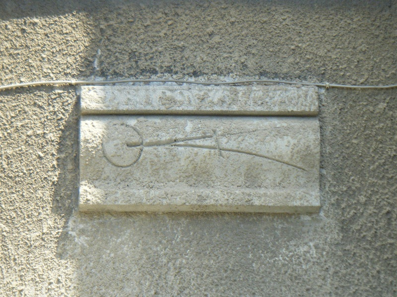 Gmerk Biura Odbudowy Stolicy na budynku przy ul. Katowickiej 8A w Warszawie.